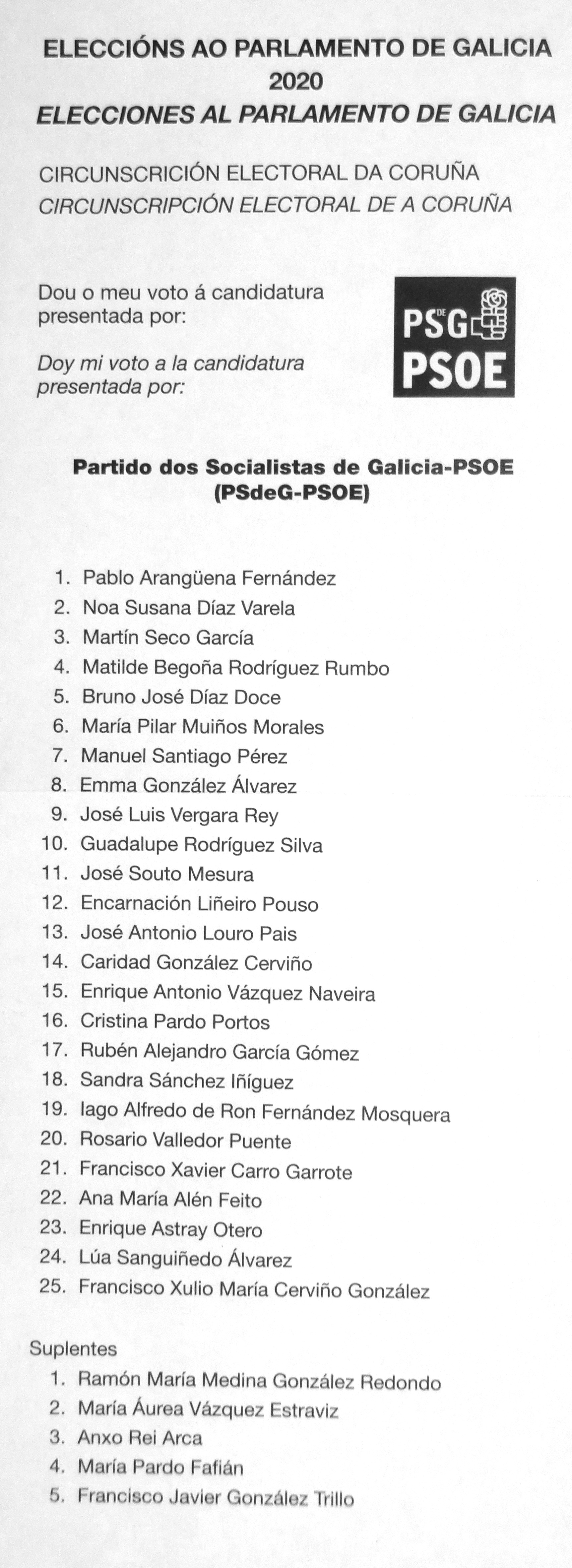 Papeletas electorais Eleccións ao Parlamento de Galicia 2020 circunscrición electoral da Coruña - xullo - PSdG